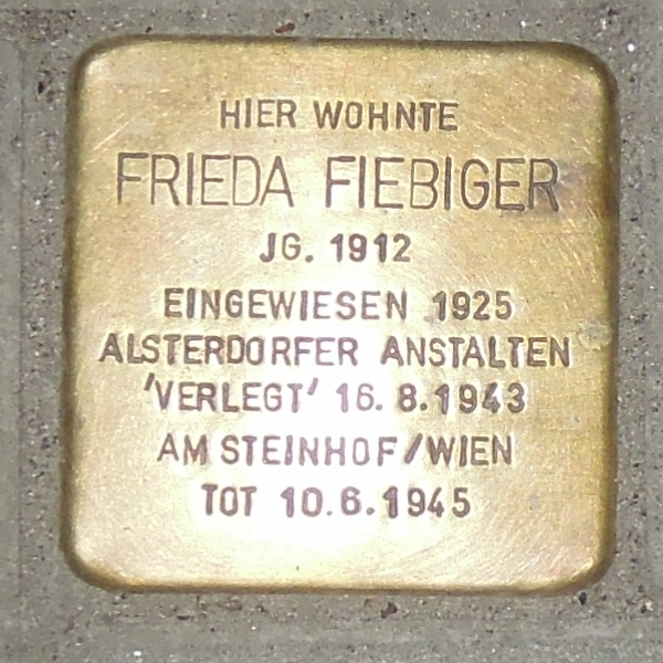 Stolperstein Bergedorf Frieda Fiebiger